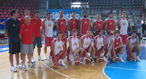 Immagine rilasciata dal proprietario della stessa, pallacanestro Varese